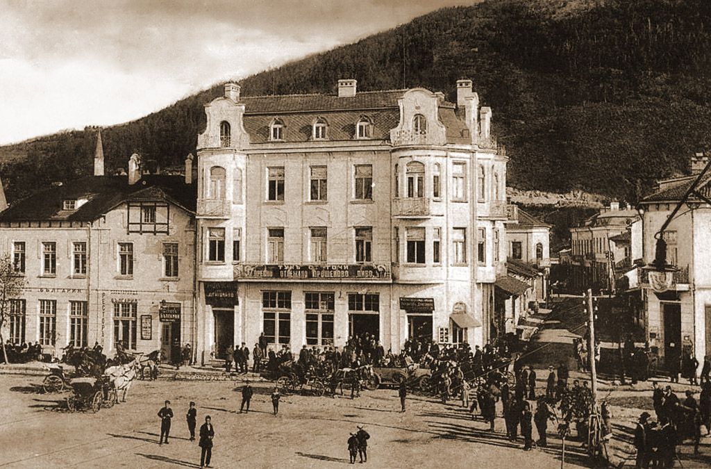 Кюстендил 1905 г.